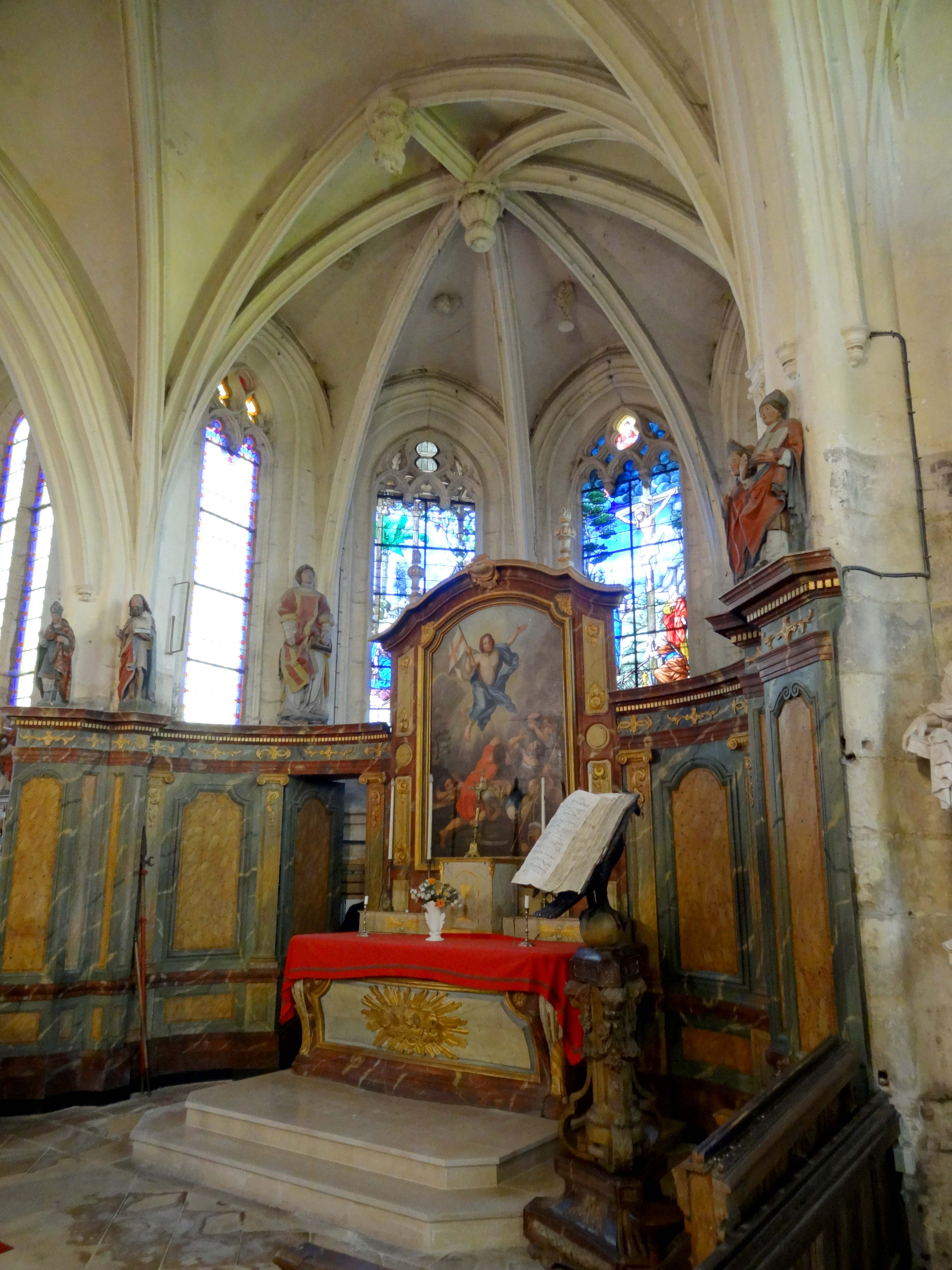 Intérieur de l'église - voir titre.